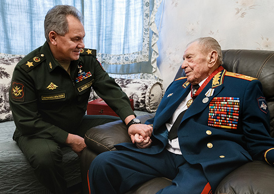 Министр обороны России генерал армии Сергей Шойгу вручил Маршалу Советского Союза Дмитрию Язову орден «За заслуги перед Отечеством» III степени